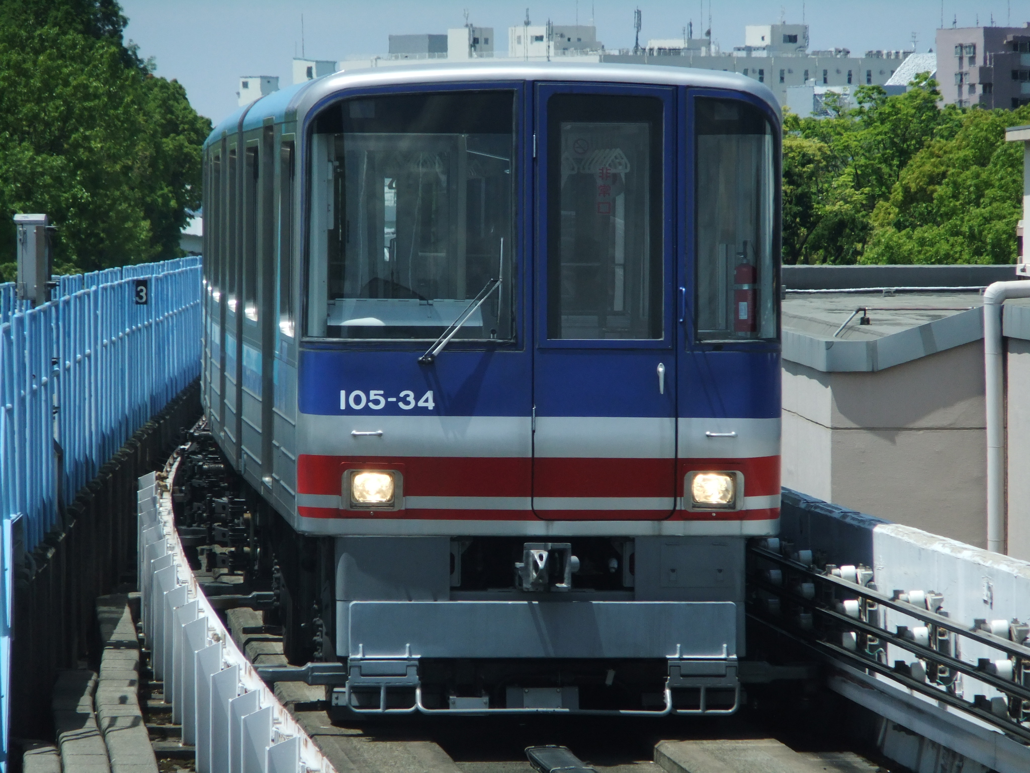 ニュートラム 105-34